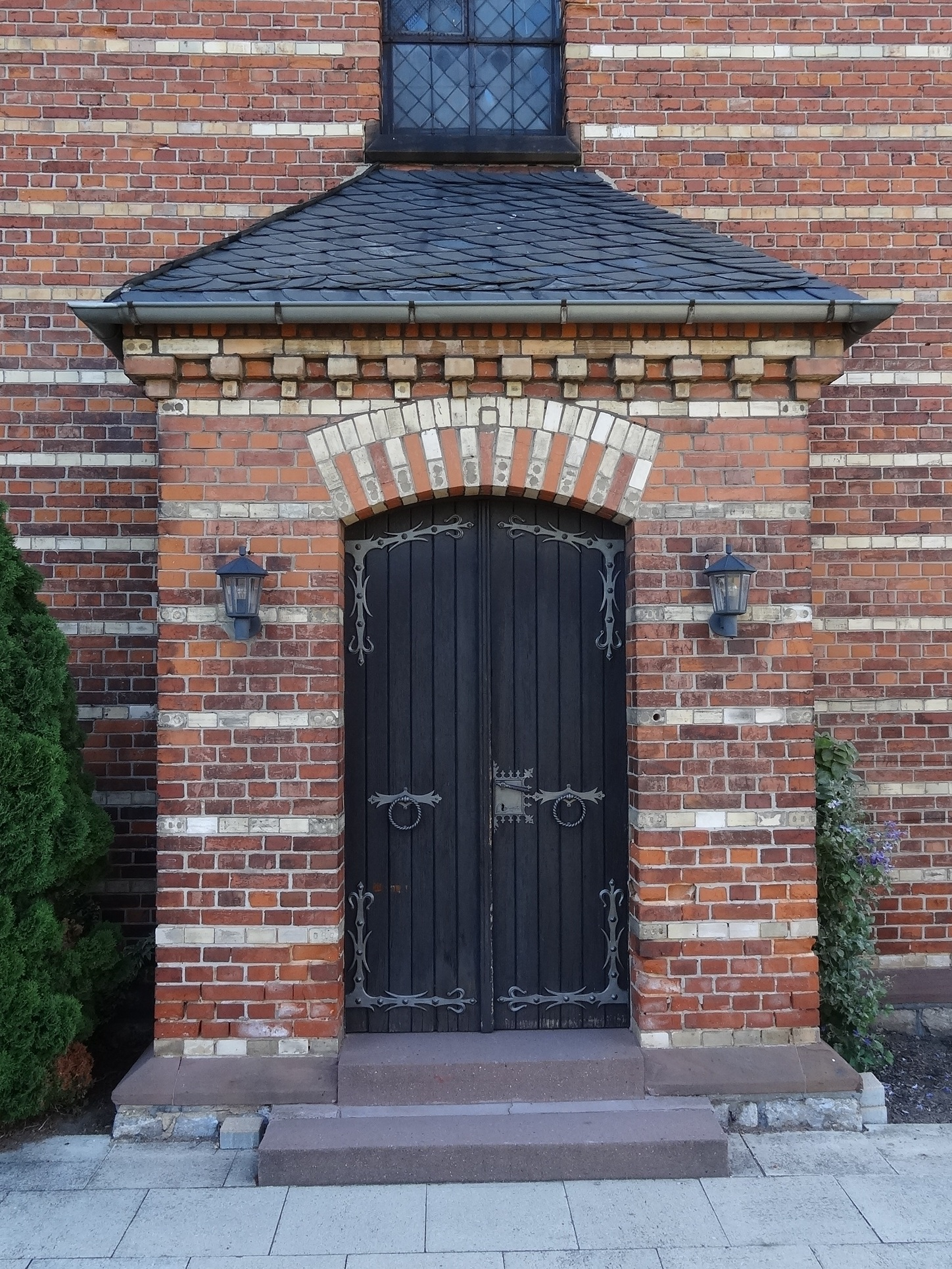 Friedhofskapelle, ehem St Joseph, Griedeler Straße 52 (Butzbach)